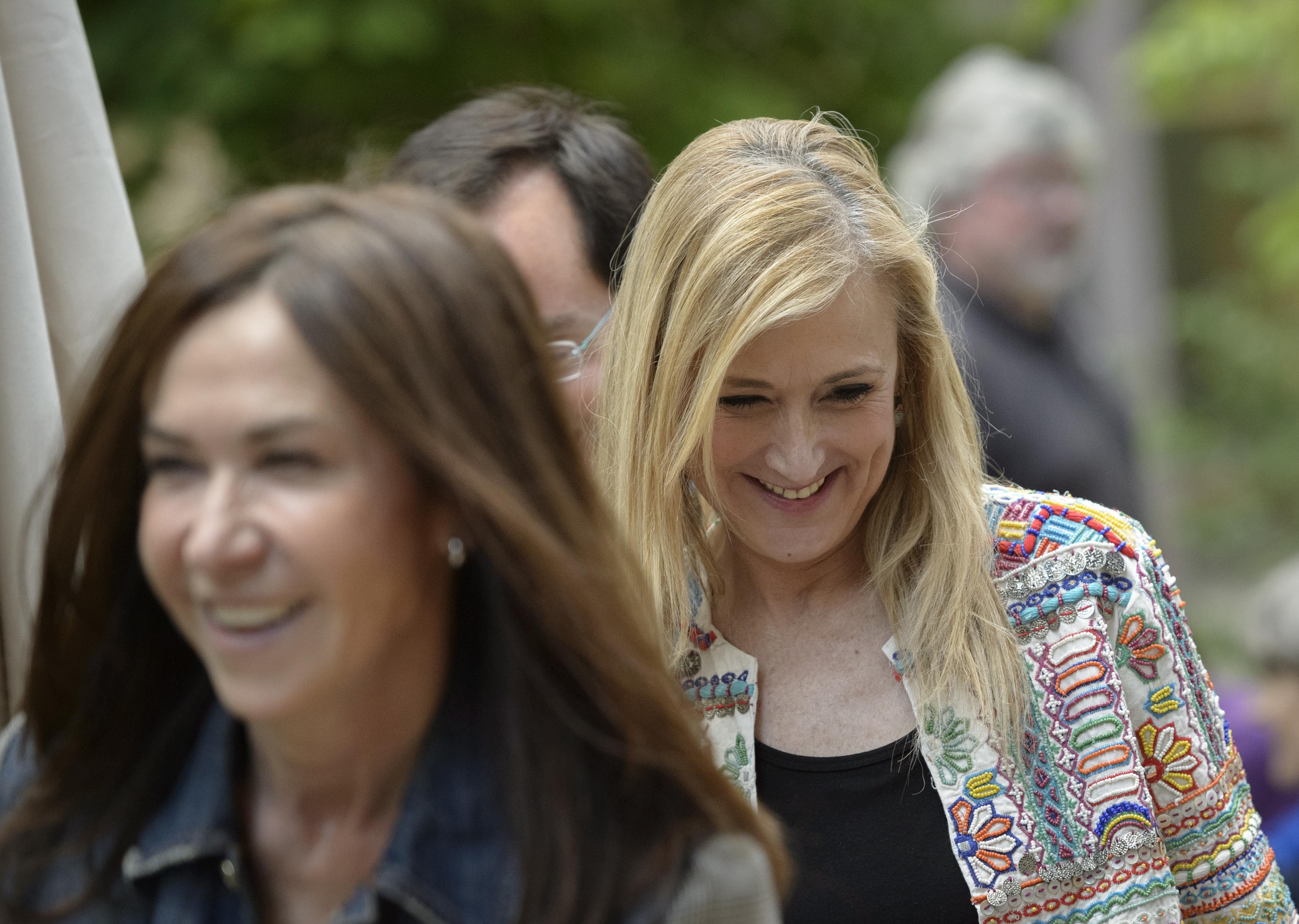 Esta tarde he reunido con colectivos LGTB para reiterar mi compromiso con ellas y para que la administración haga todo lo posible para acabar con la discriminación y agresiones homófonas en la región. Por eso, elaboraré una Ley de Protección contra la Discriminación y por la Igualdad de Trato.